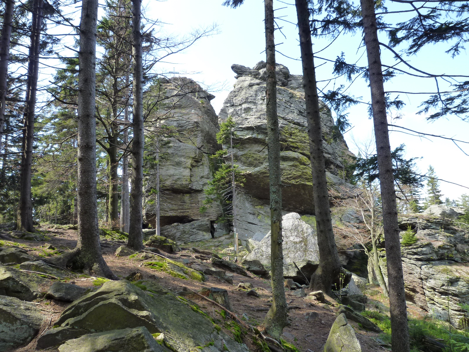 Die Felsengruppe der Rauchröhren bei Arrach ist ein beliebter Kletterfelsen. Die Felsengruppe liegt auf dem sogenannten Kaitersberg zwischen Eck und der Kötzinger Hütte im Landkreis Cham. Die Felsengruppe gehört zu den Geotopen im Landkreis Cham mit der Nr. 372R016.